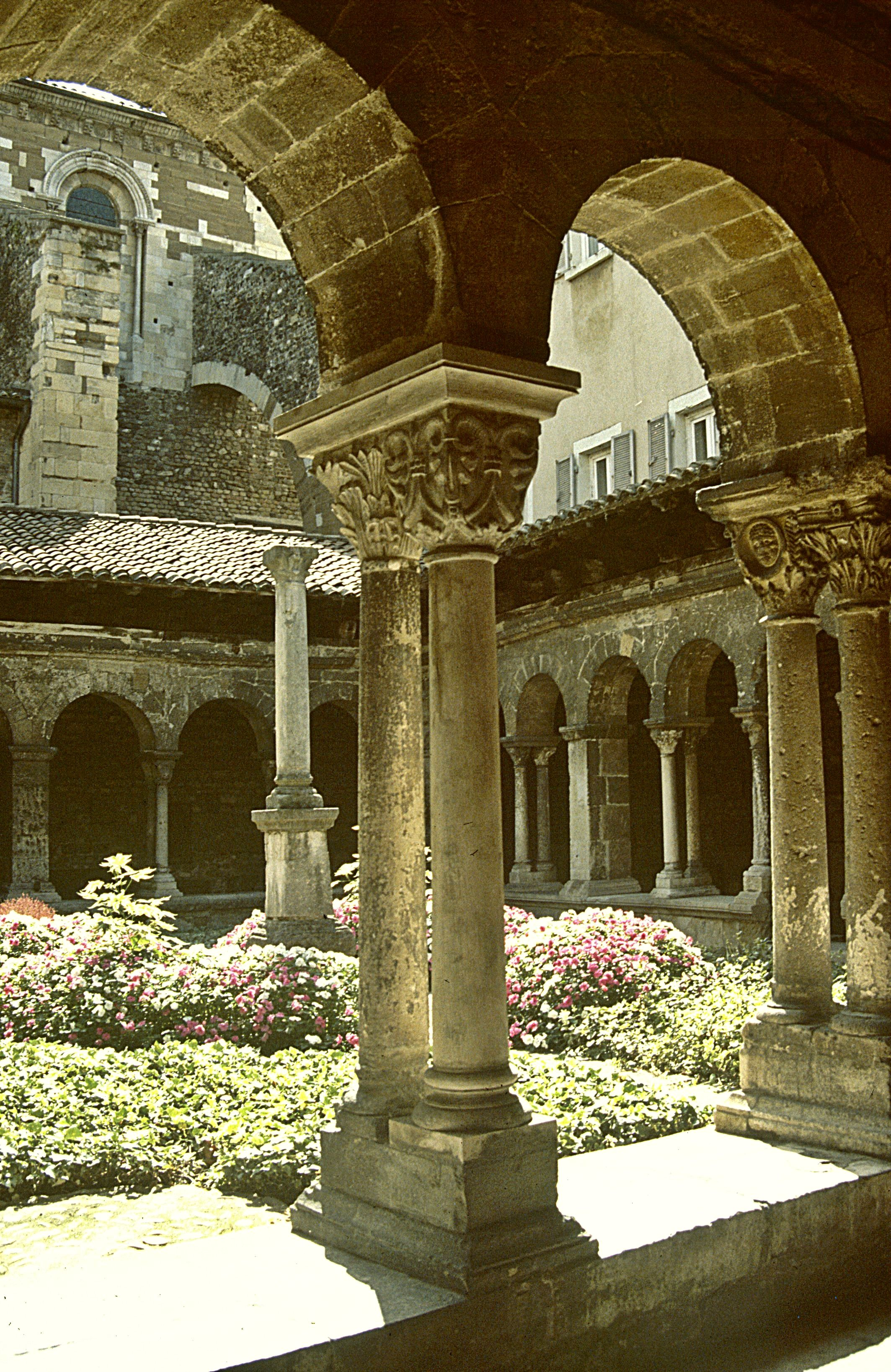 Vienne: Saint-André-le-Bas, Kreuzgang